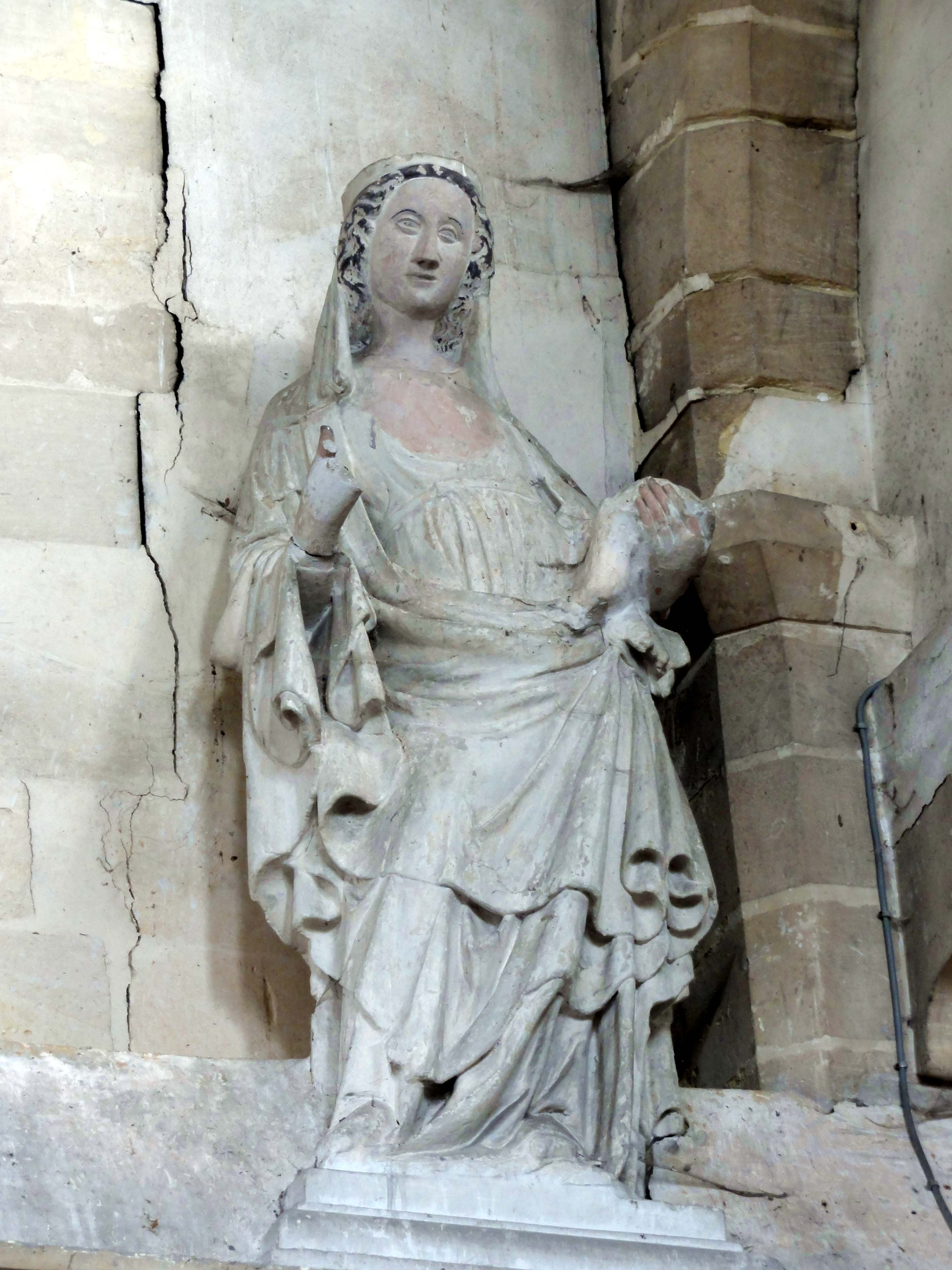 Vierge à l'Enfant, pierre calcaire, première moitié du XIVe siècle.